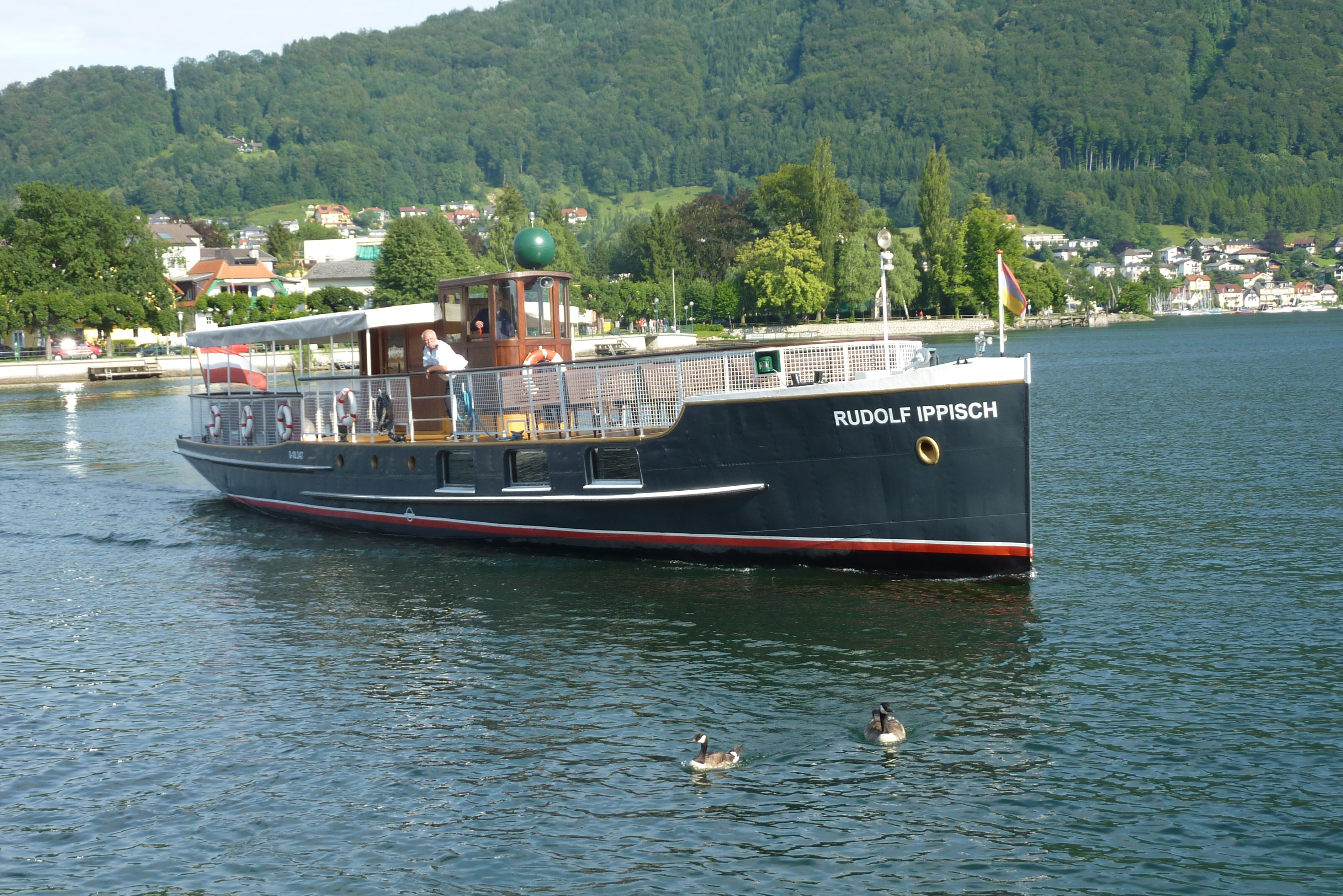 Schiff "Rudolf Ippisch" am Traunsee (Österreich).